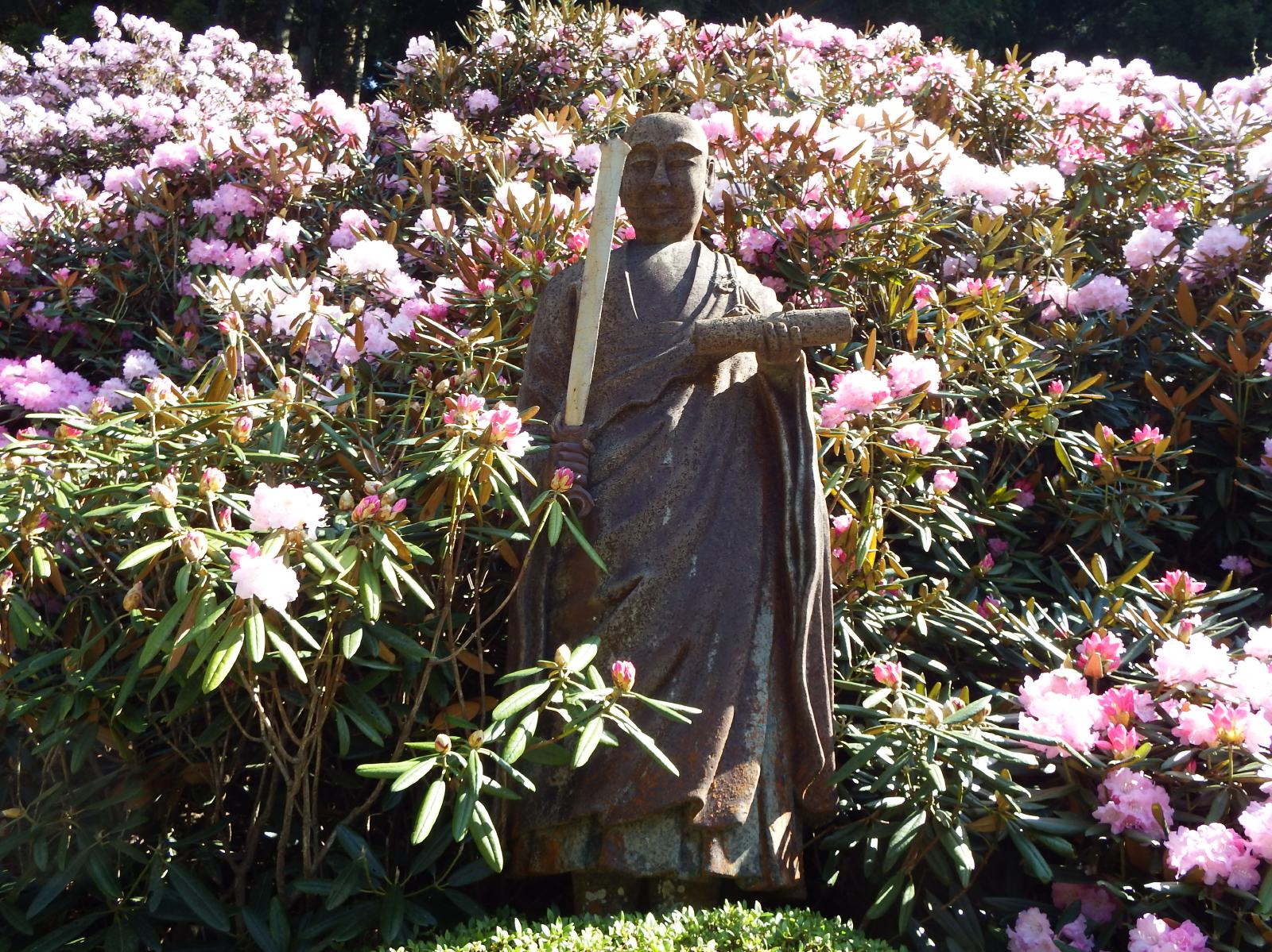 横峰寺の星供大師像